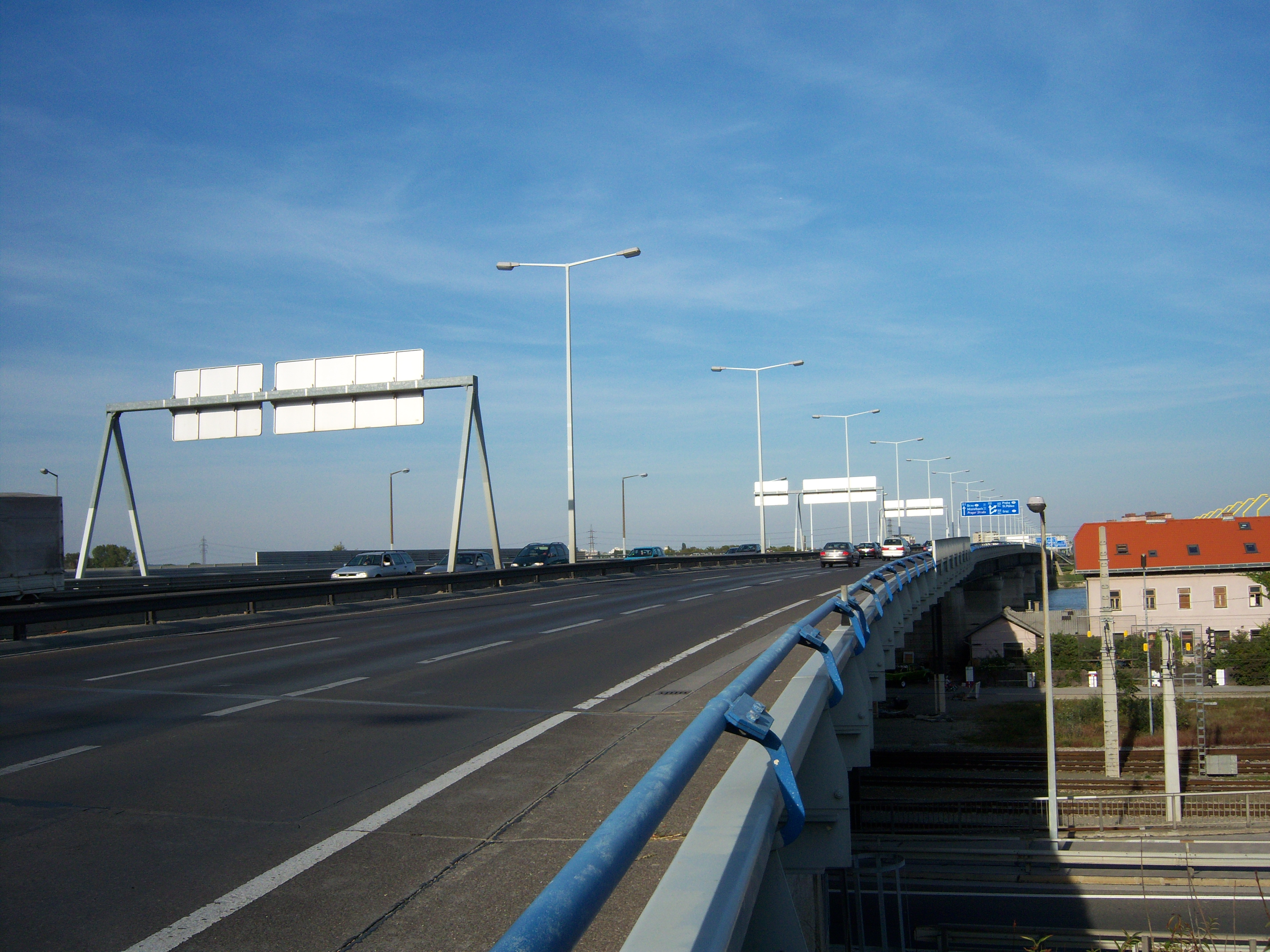 Auffahrt Nordbrücke